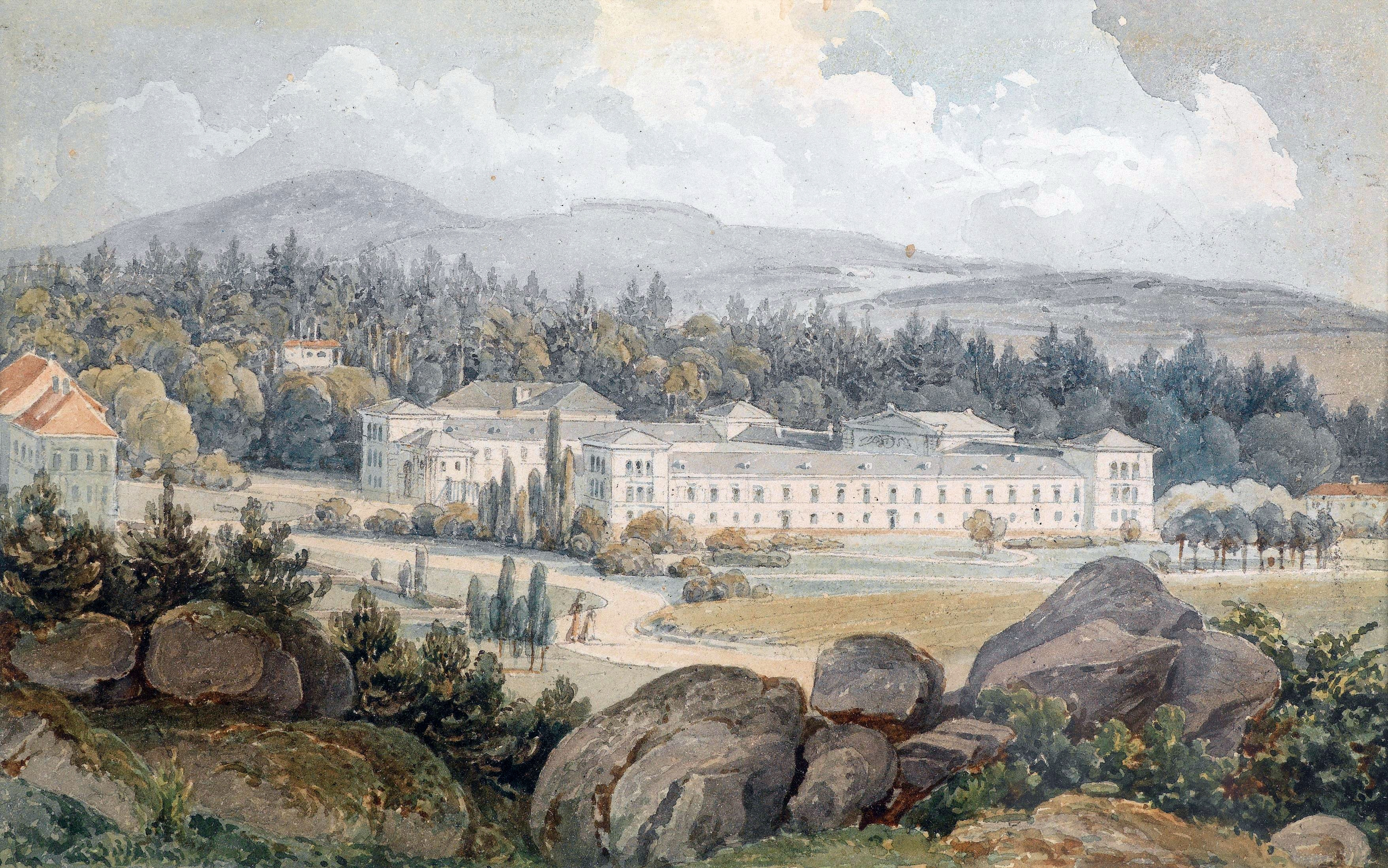 Der Kurort Königswart in Böhmentitle QS:P1476,de:"Der Kurort Königswart in Böhmen" label QS:Lde,"Der Kurort Königswart in Böhmen"